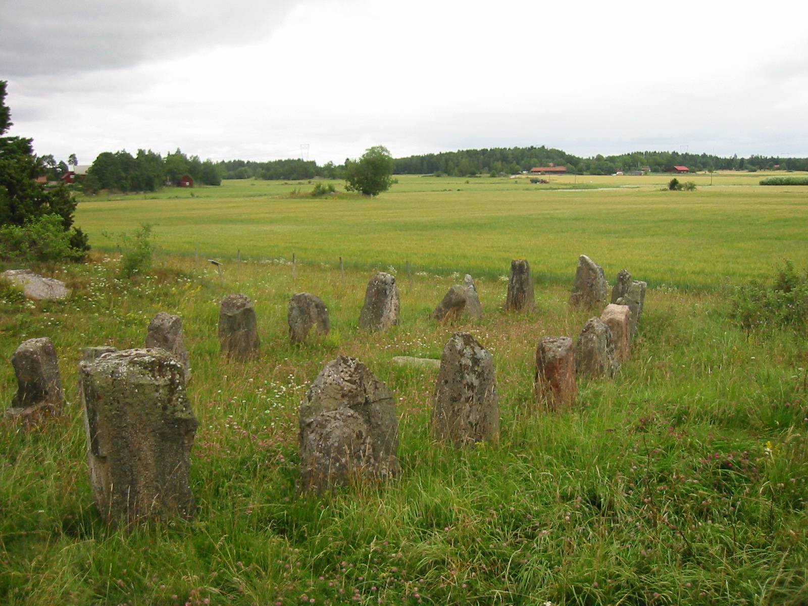 Skeppssättningen vid Årby gravfält, Hallstahammar. Vy från söder